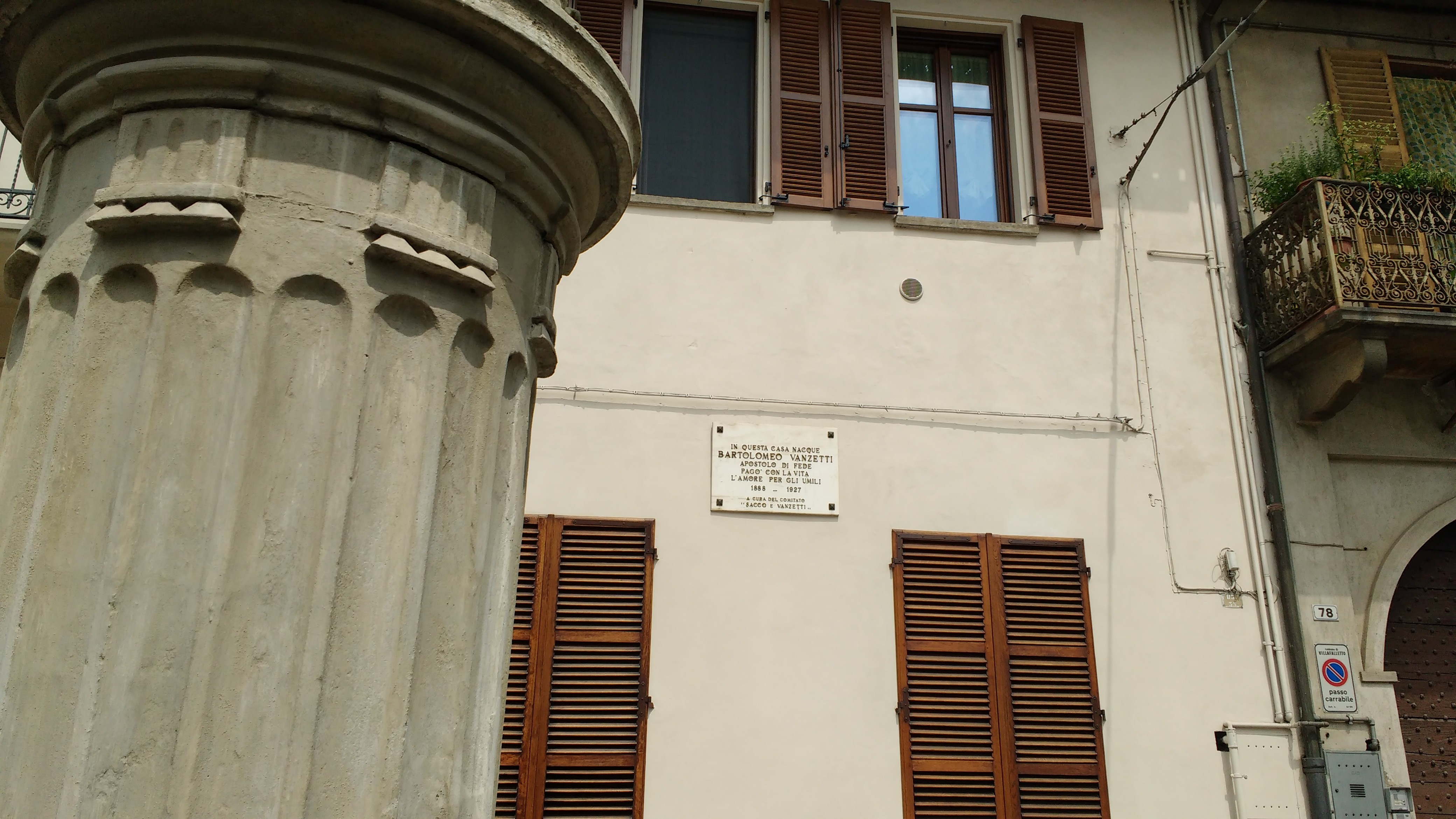 Lapide posta a memoria sulla facciata della casa ove nacque Bartolomeo Vanzetti